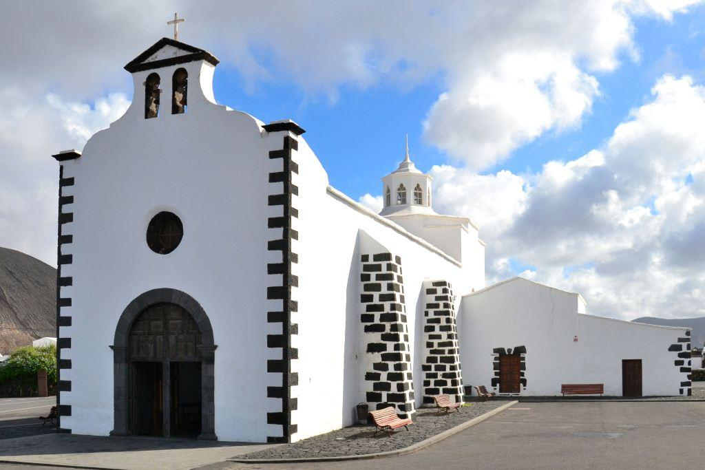 Wallfahrtskirche Los Dolores in Mancha Blanca, Lanzarote, Kanarische Inseln